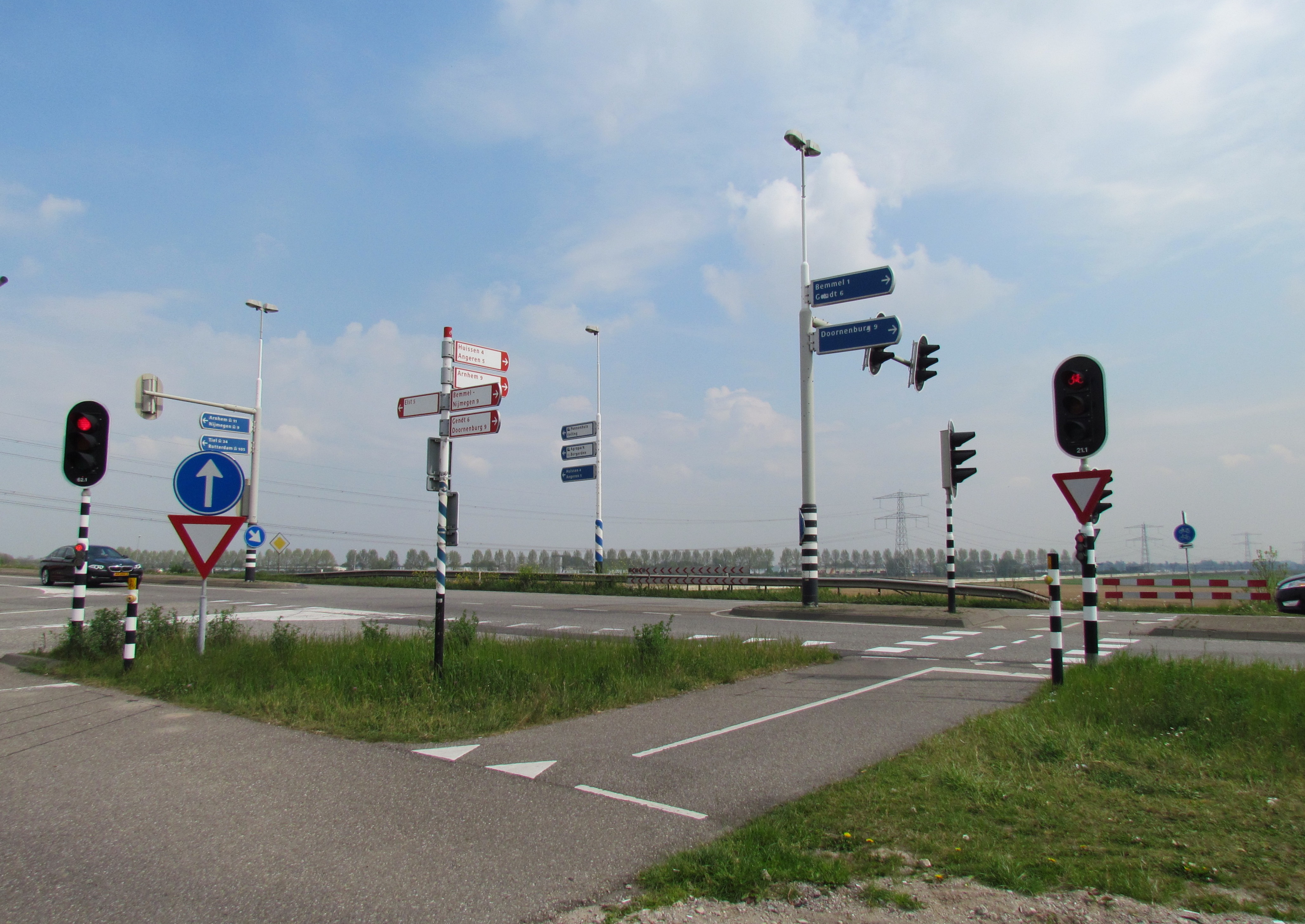 T-splitsing waar de oostelijke uitloper van de A15 uitkomt op de N839. De A15 zal vanaf ... worden doorgetrokken waardoor deze T-splitsing zal verdwijnen.